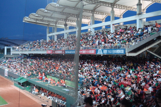 中文（台灣）: 新莊棒球場觀眾席夜景 Lanew熊對統一7-ELEVEn獅